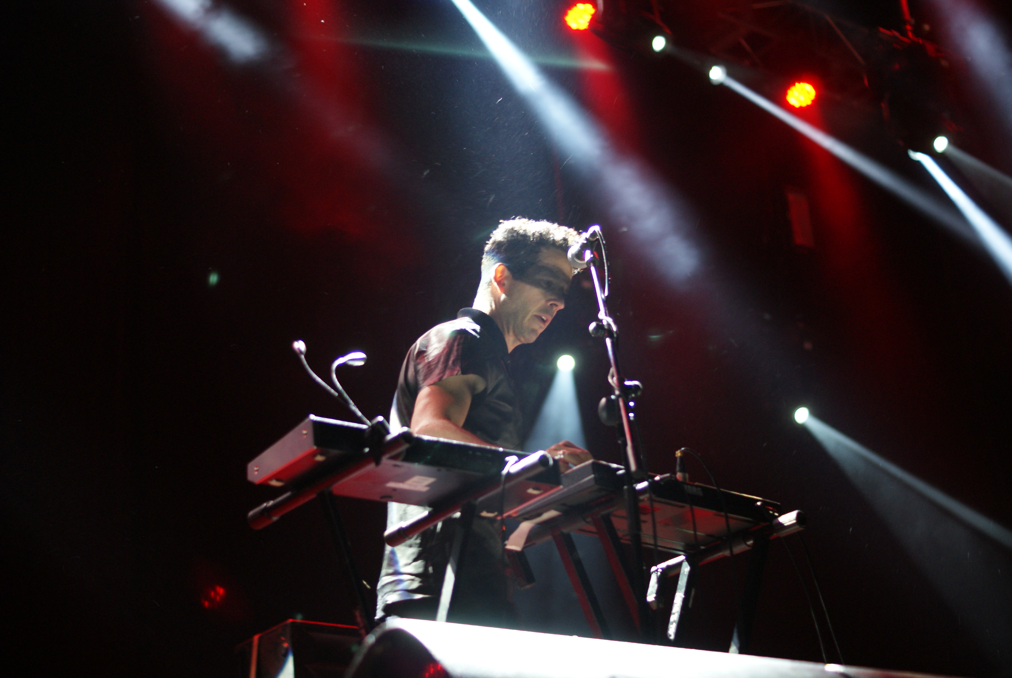 El grupo Monarchy en el festival Palencia Sonora 2016.